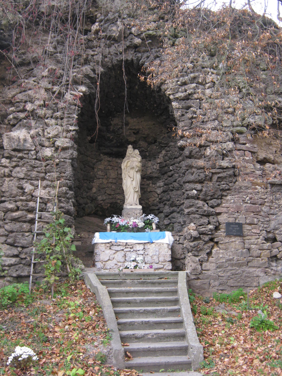 Статуя Діви Марії (грот у стіні довкола костелу Небовзяття, Бучач)